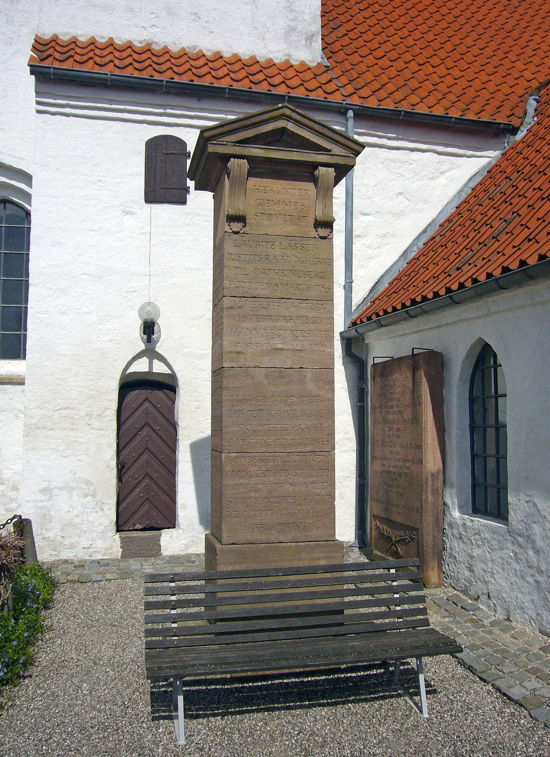 Sengeløse Kirke, Høje-Taastrup, Denmark. Memorial